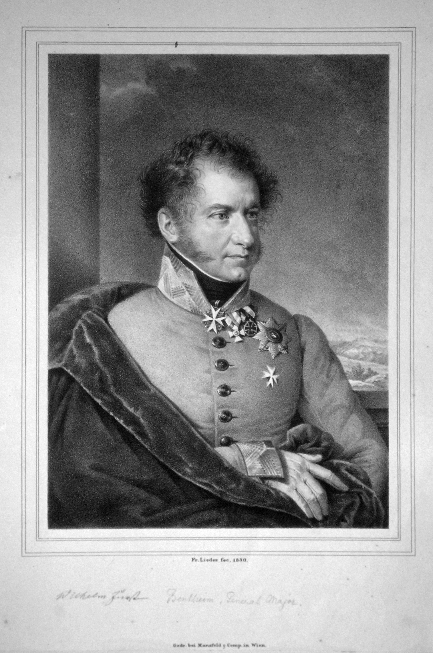 Friedrich Wilhelm Belgicus von Bentheim-Bentheim (1782-1839), k. k. Feldmarschalleutnant. Lithographie von Friedrich Lieder, 1830